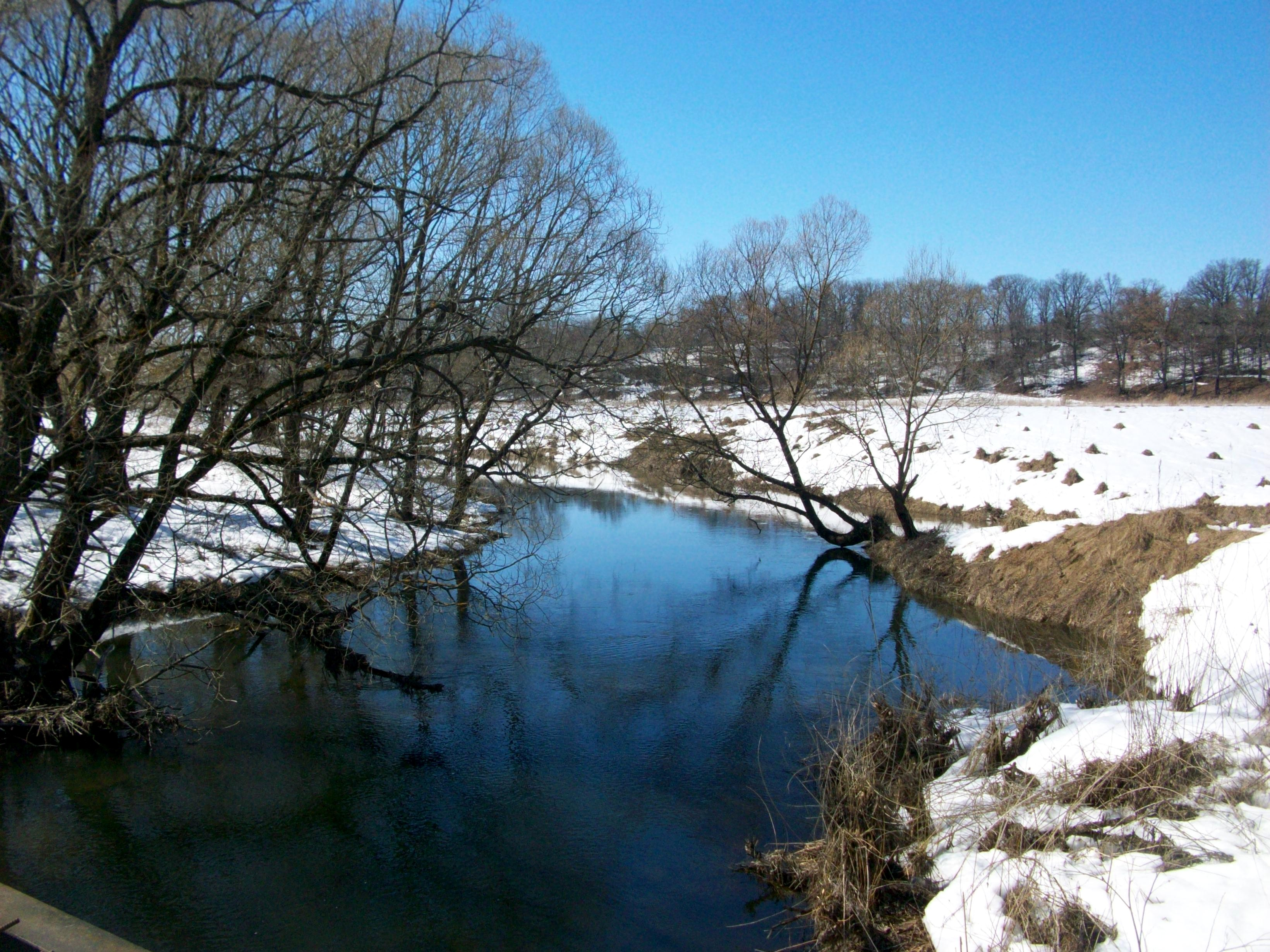 Бежин луг, Чернский район This image is related to the protected area of Russia number 7110081